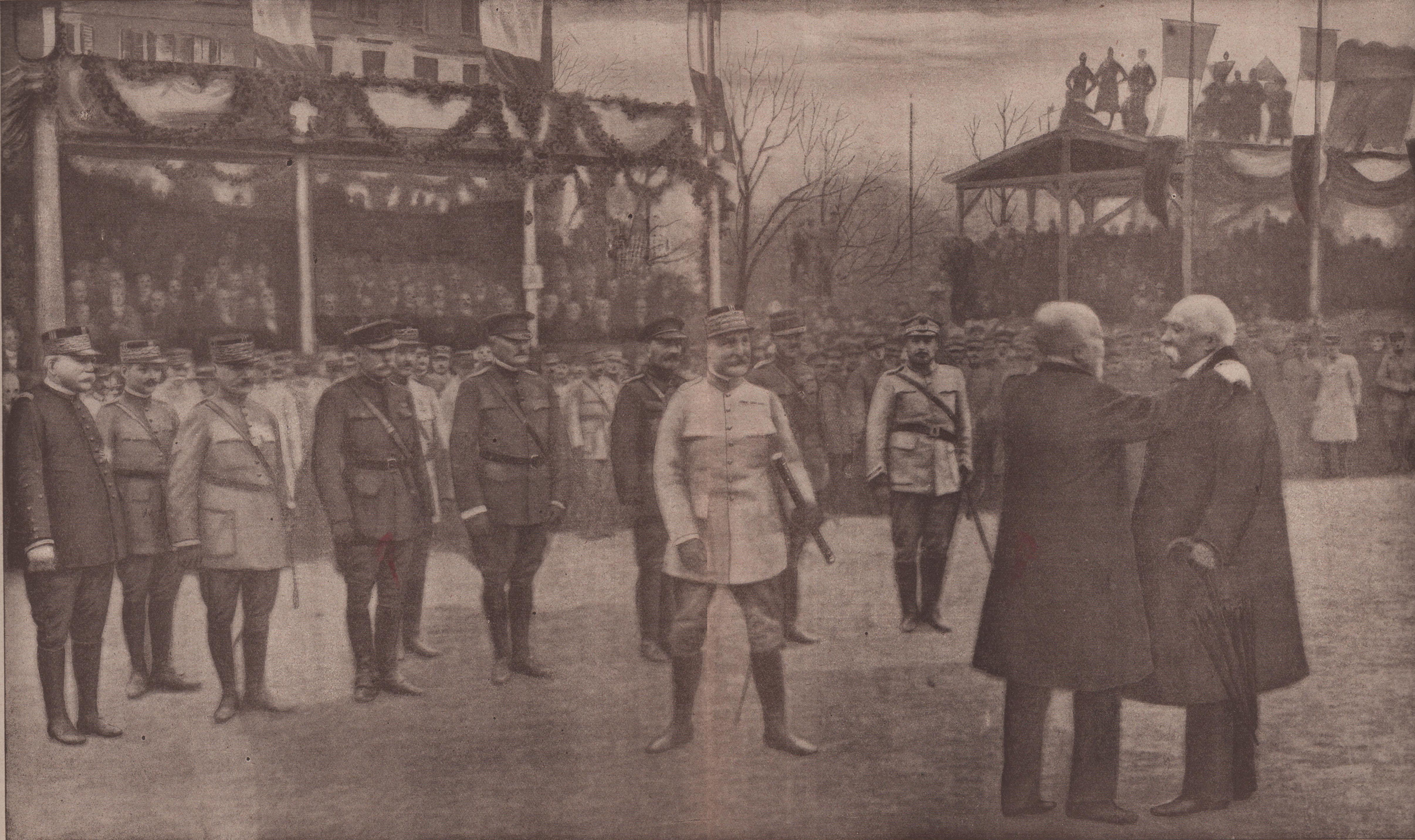 Cérémonie au cours de laquelle, à Metz le 8 décembre 1918, Pétain devient maréchal de France. Derrière lui, les maréchaux Joffre, Foch et sir Douglas Haig (Britannique) et les généraux Pershing (Américain), Gillian (Belge), Albricci (Italien) et Haller (Polonais). Au premier plan, le président M. Poincaré fait l'accolade au chef du Gouvernement M. Clemenceau (à droite).